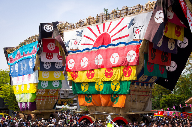 山王神社に集まった青柏祭の「でか山」